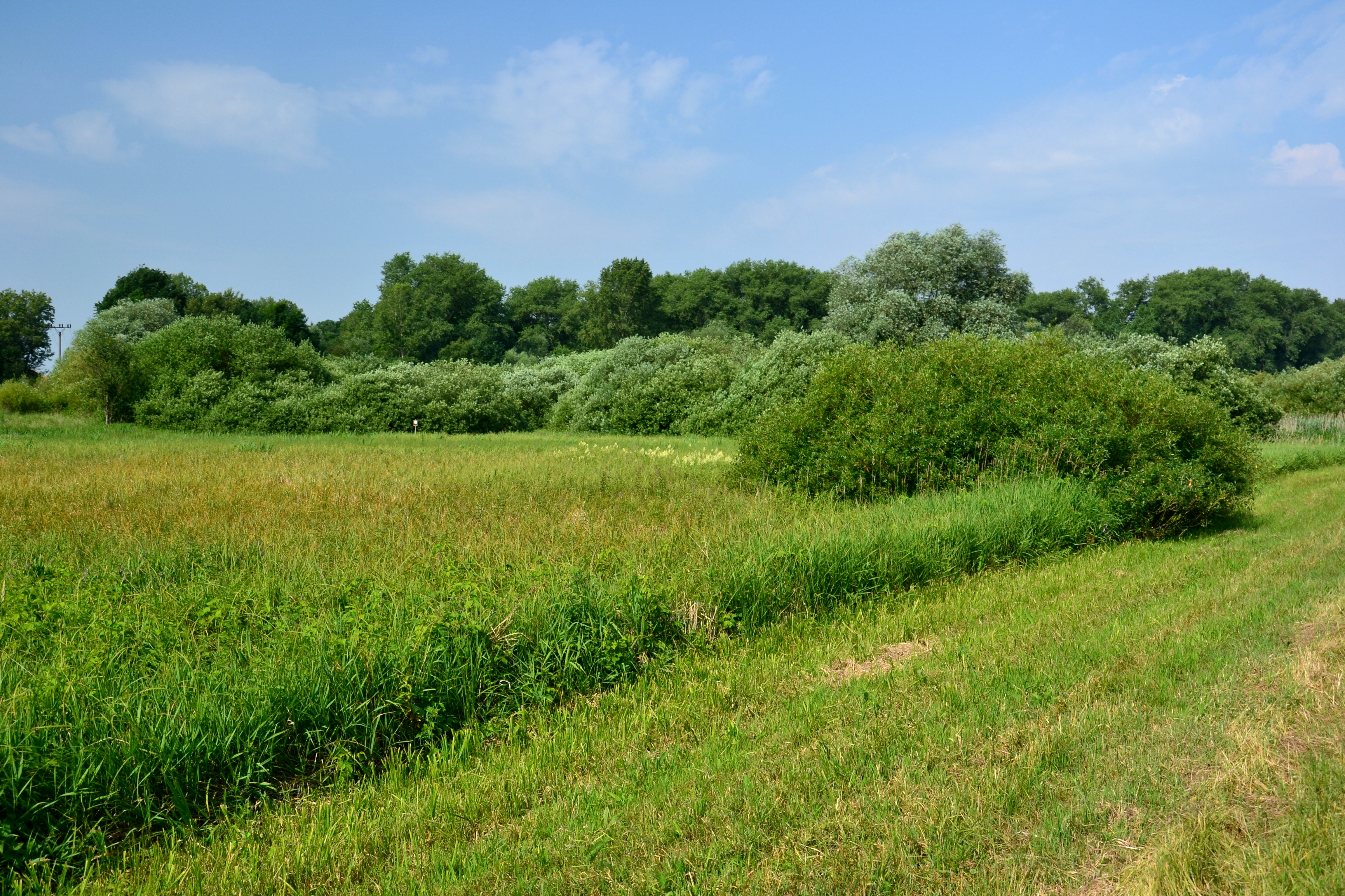 Přírodní památka Mokřad pod Terezínskou pevností